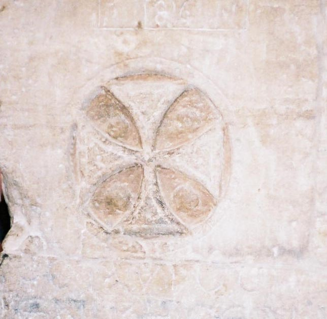 Croix copte gravée sur un mur du temple de Philae près d'Assouan (Égypte) Photo prise en avril 2003 M. Benoist